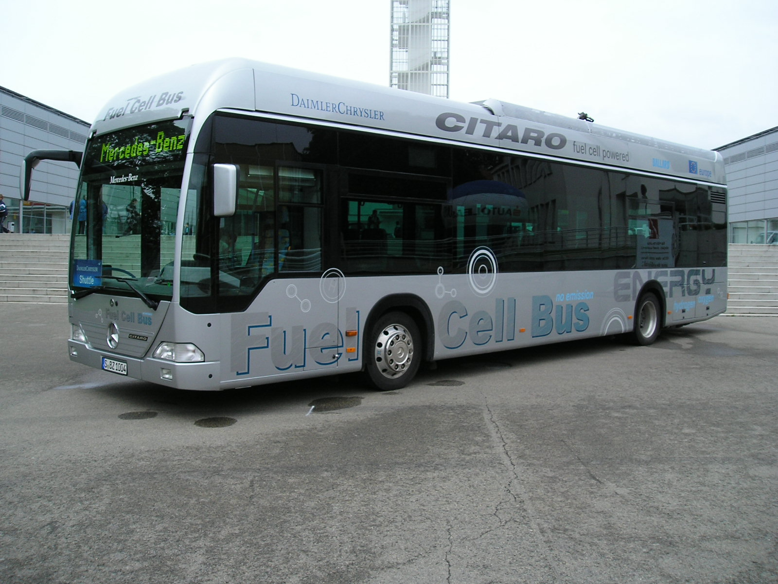 Autobus Mercedes Benz Citaro s pohonem na palivové články na brněnském výstavišti při Autotecu 2006